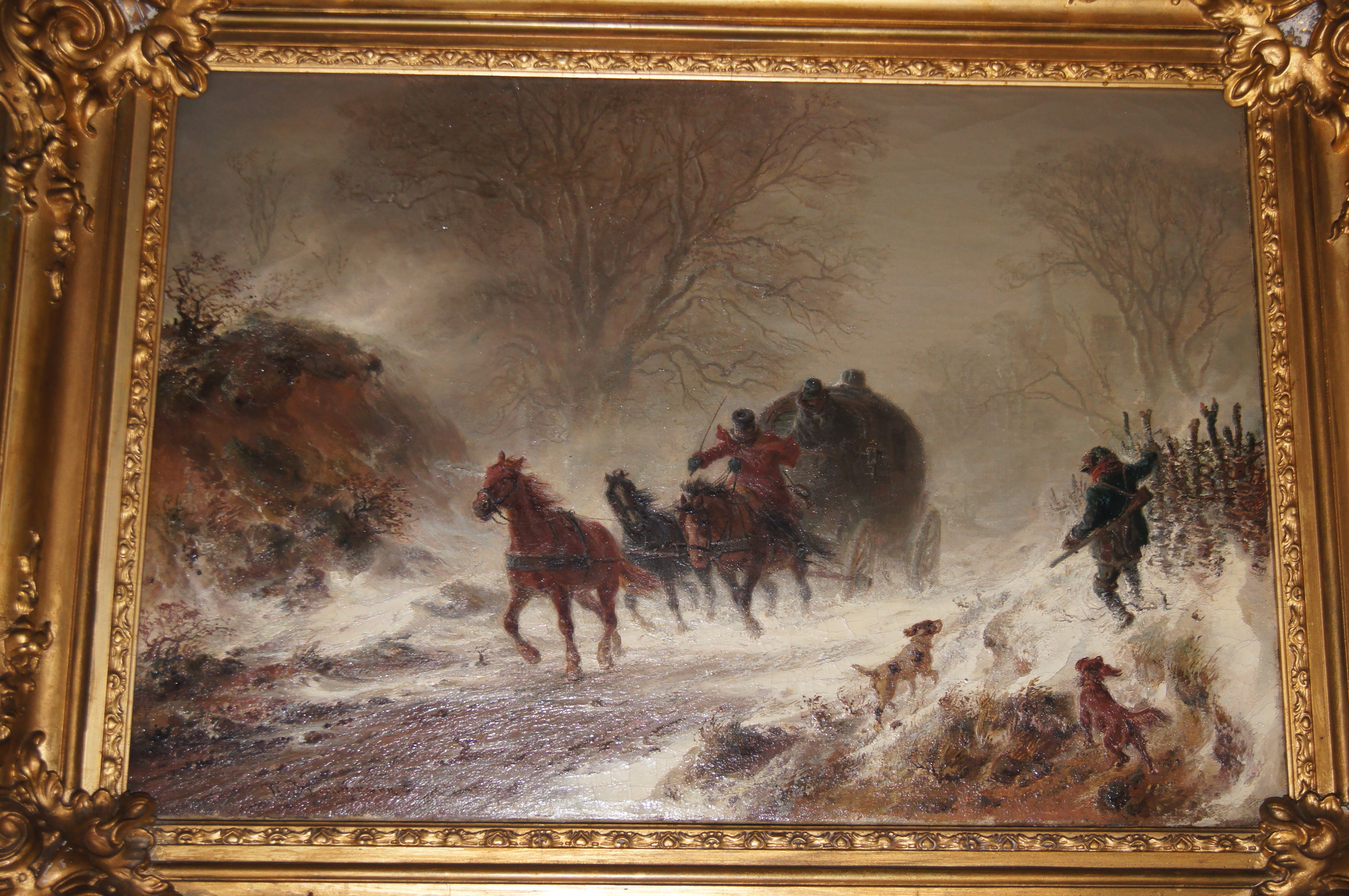 Postwagen im Schnee - Berühmtes Gemälde von Hermann Kauffmann